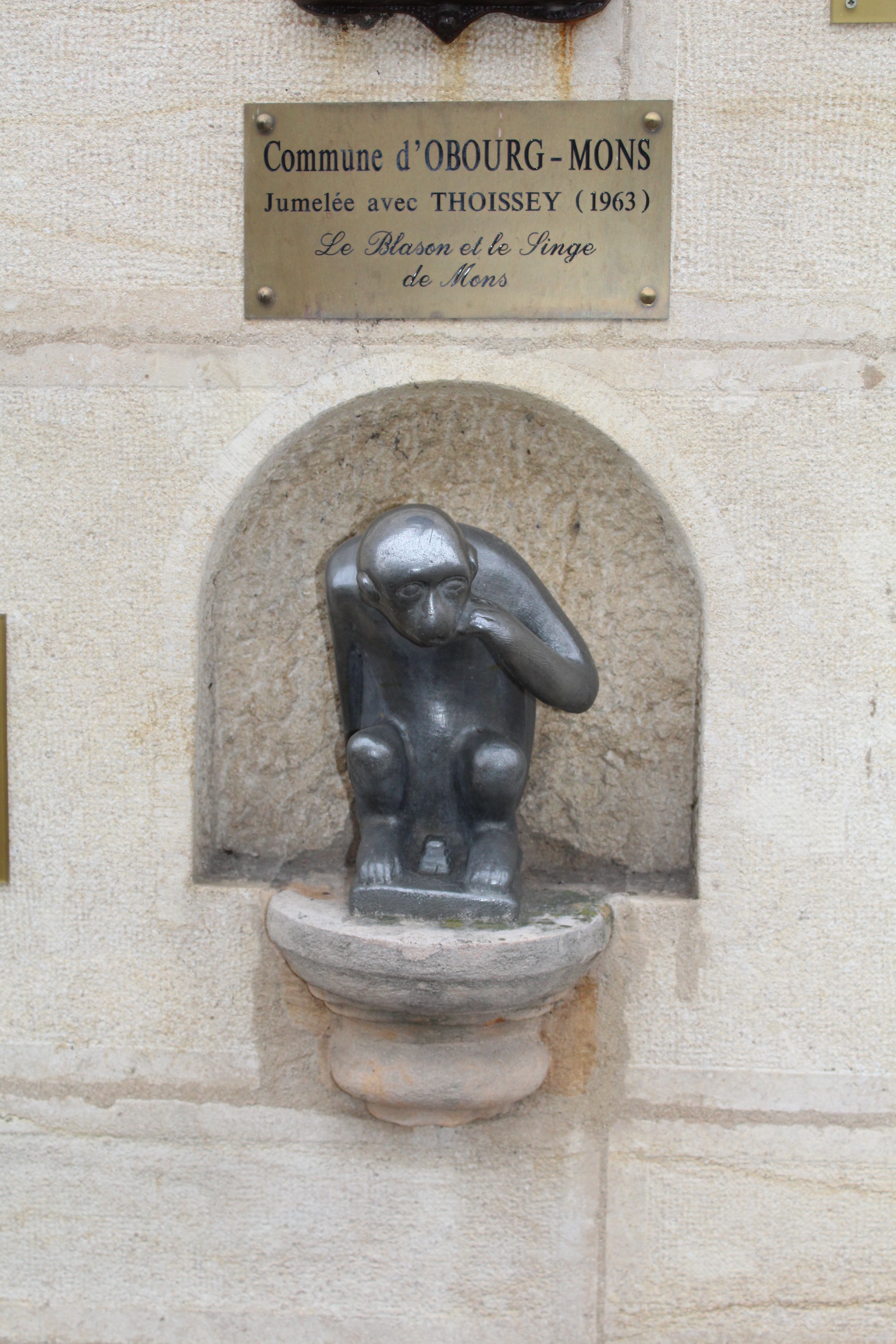 Élements montrant le jumelage entre Thoissey et Obourg installés sur la façade de l'hôtel de ville.